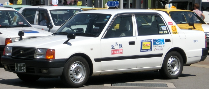 石川近鉄タクシーのコンフォート